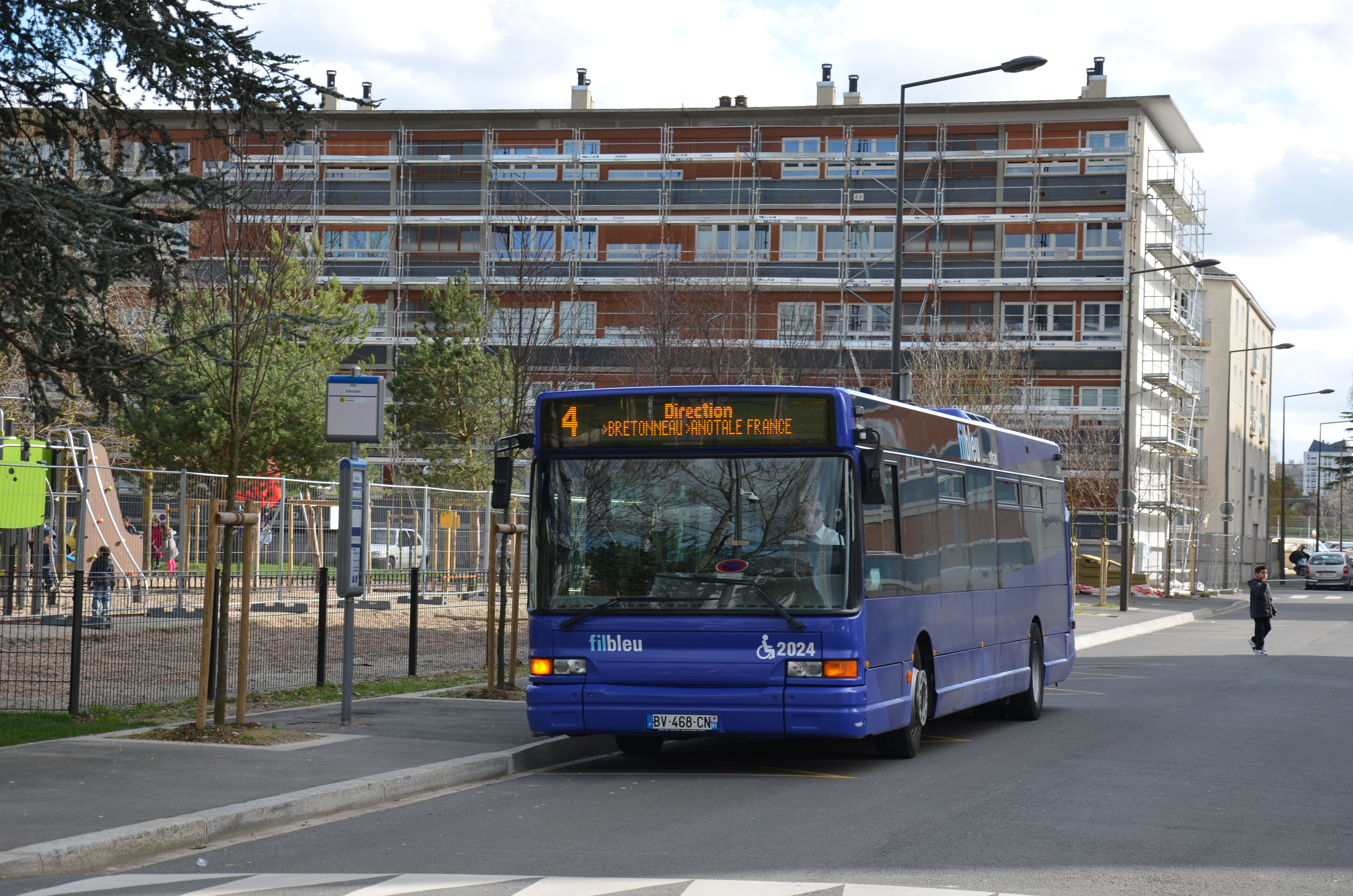 Heuliez GX 317 n°2024 sur la ligne 4 du réseau FIL BLEU, à l'arrêt de départ Vénien.